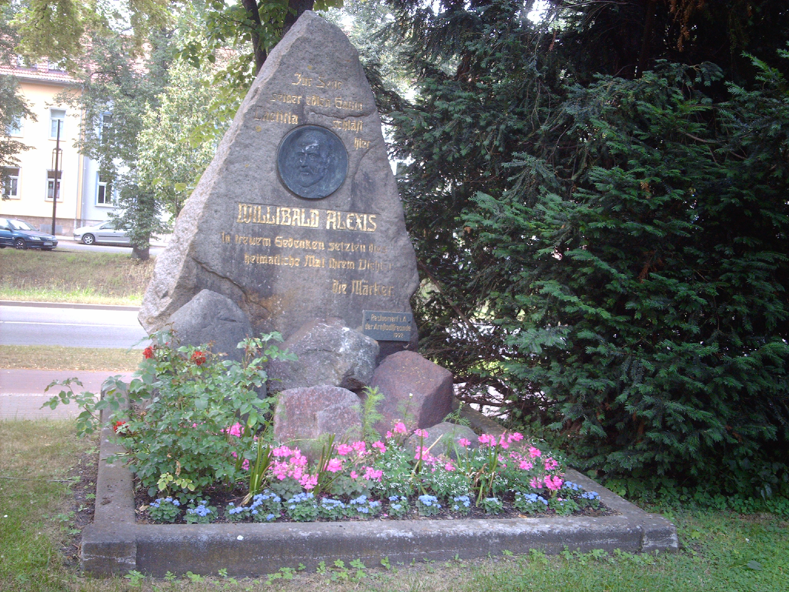 Grabstein von Willibald Alexis auf dem Alten Friedhof in Arnstadt (Deutschland).